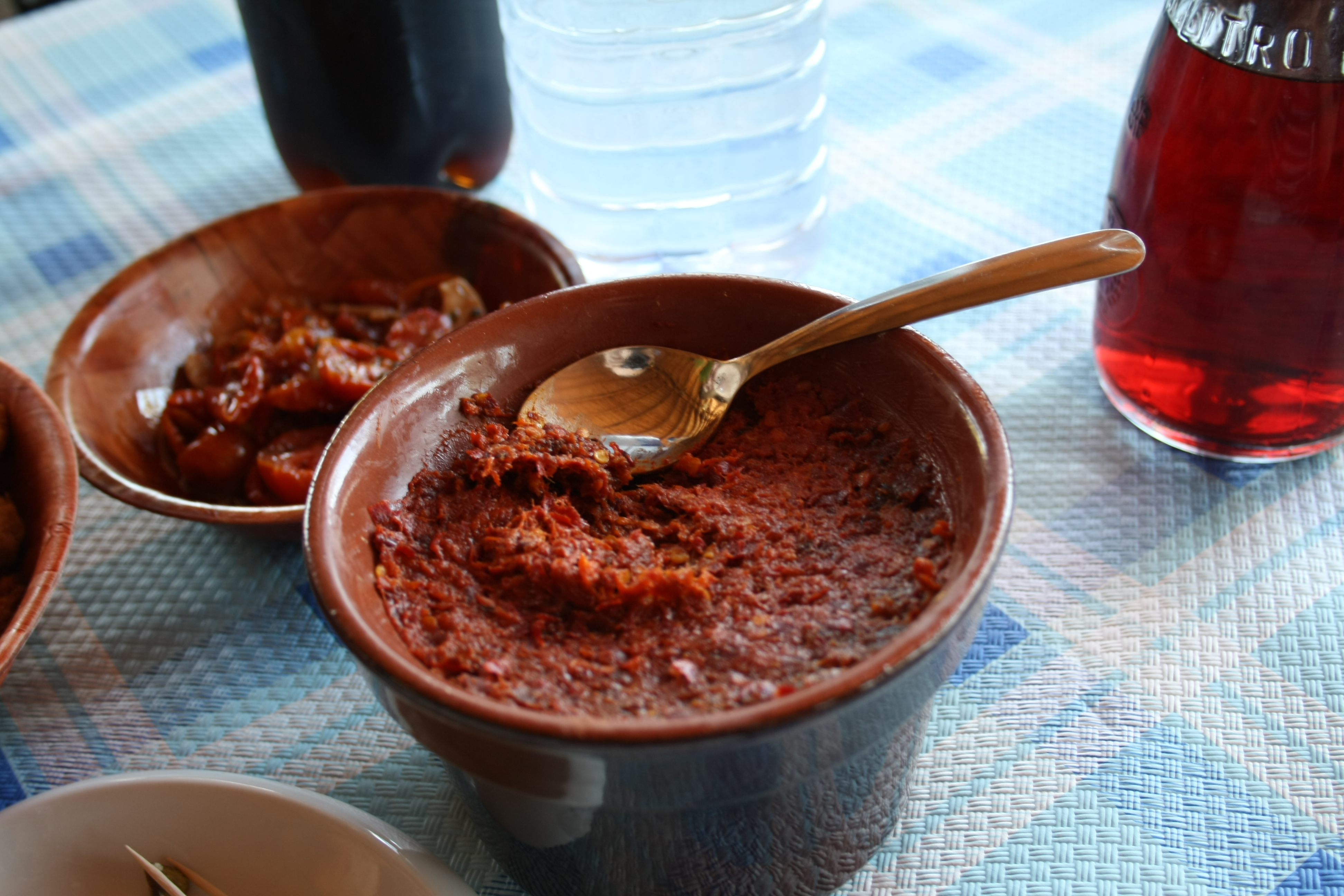 'Nduja.